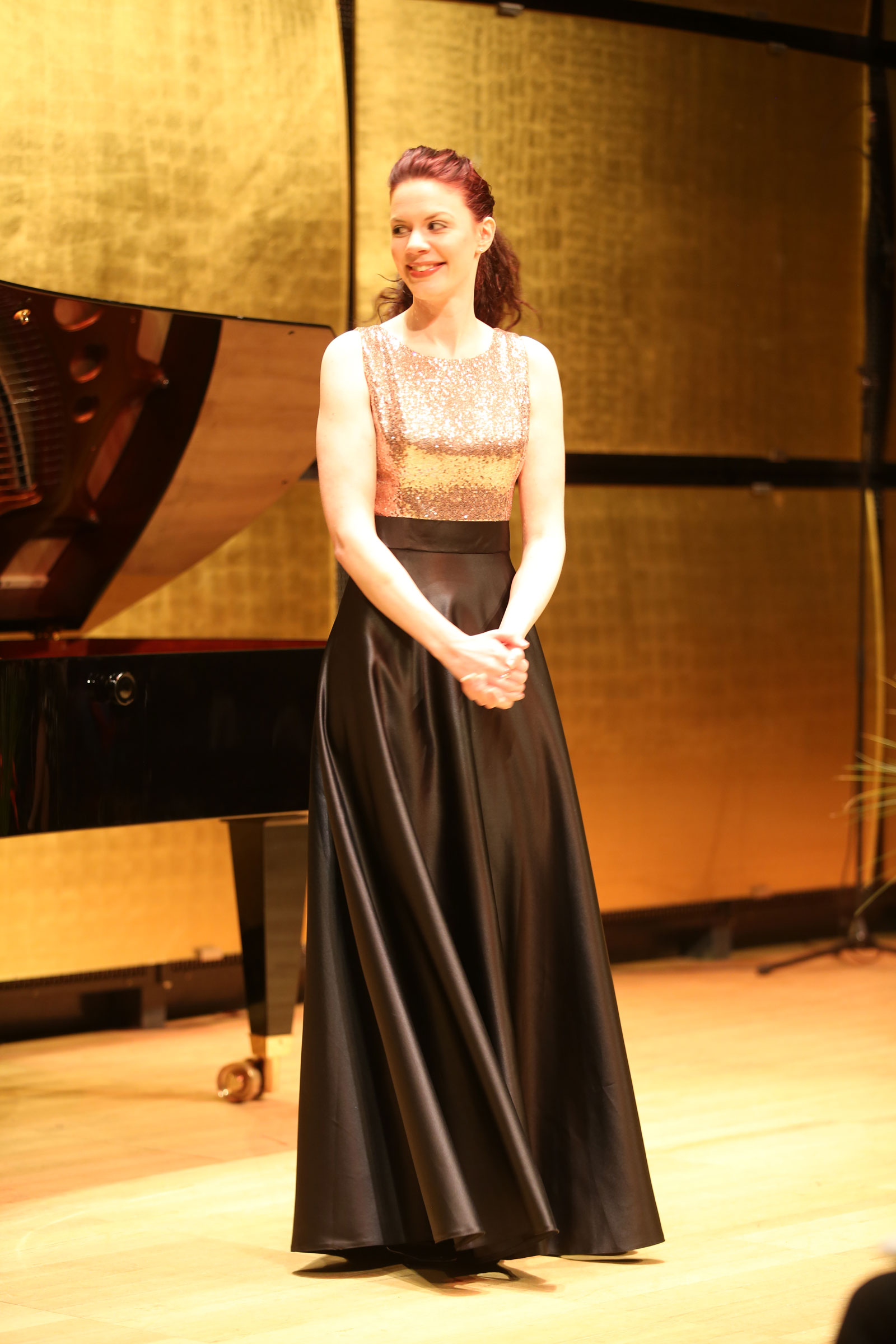 4-Catriona.Morison-7987